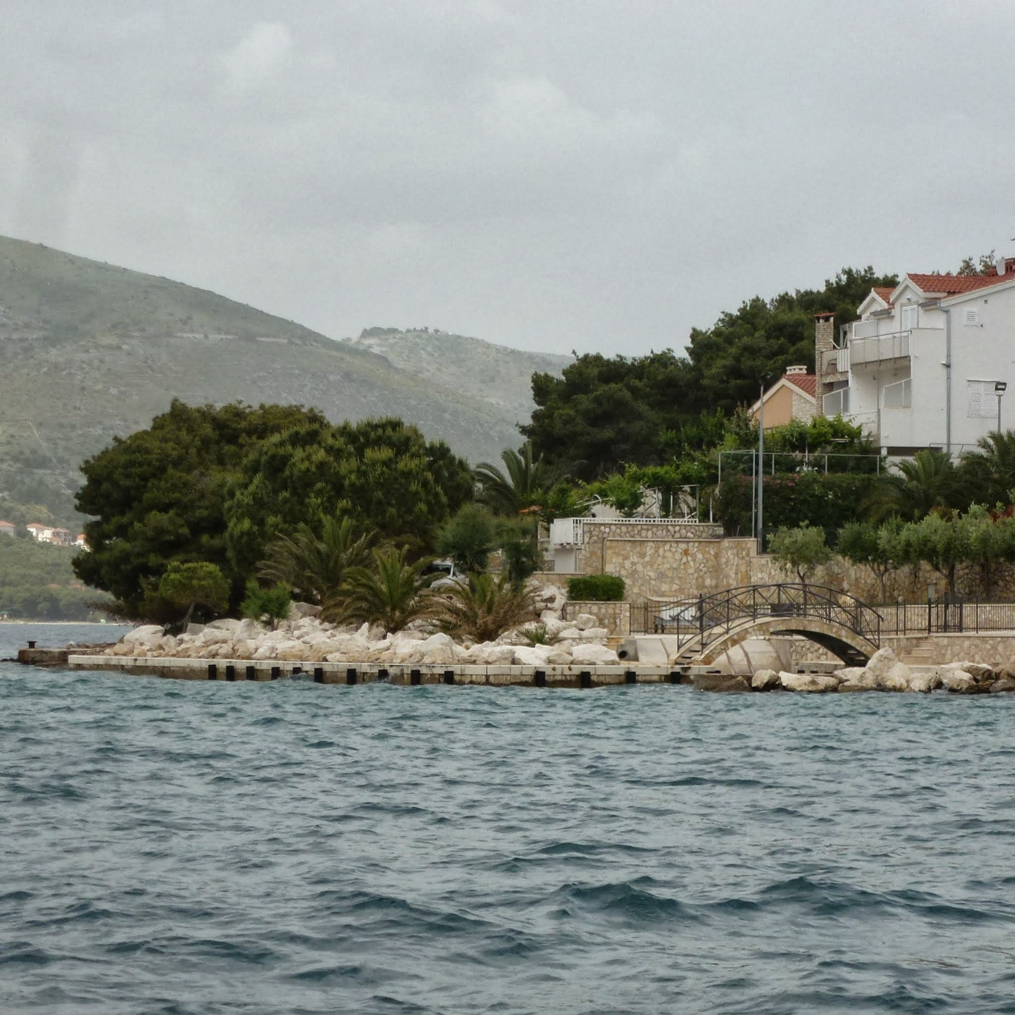 Остров Чиово, Croatia